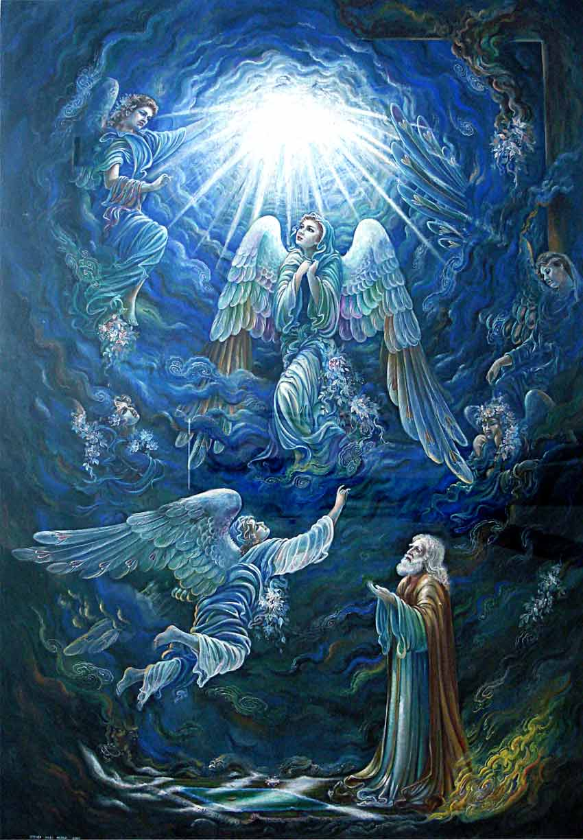 آتش اثر یوسف عبدی نژاد - تکنیک: گواش و آبرنگ - تاریخ ۱۳۷۹